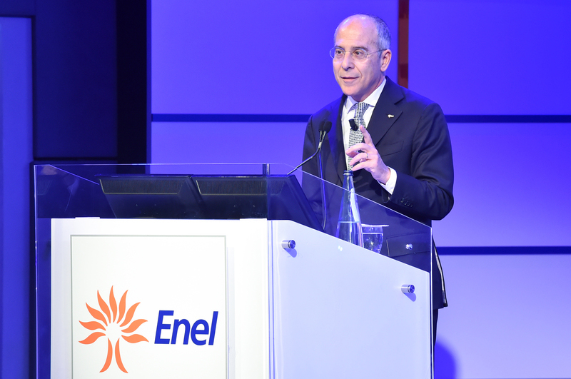 Matrix, Francesco Starace